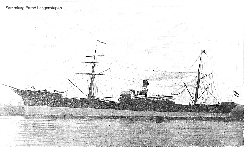 Der Dampfer Rheinfels der DDG Hansa 1889